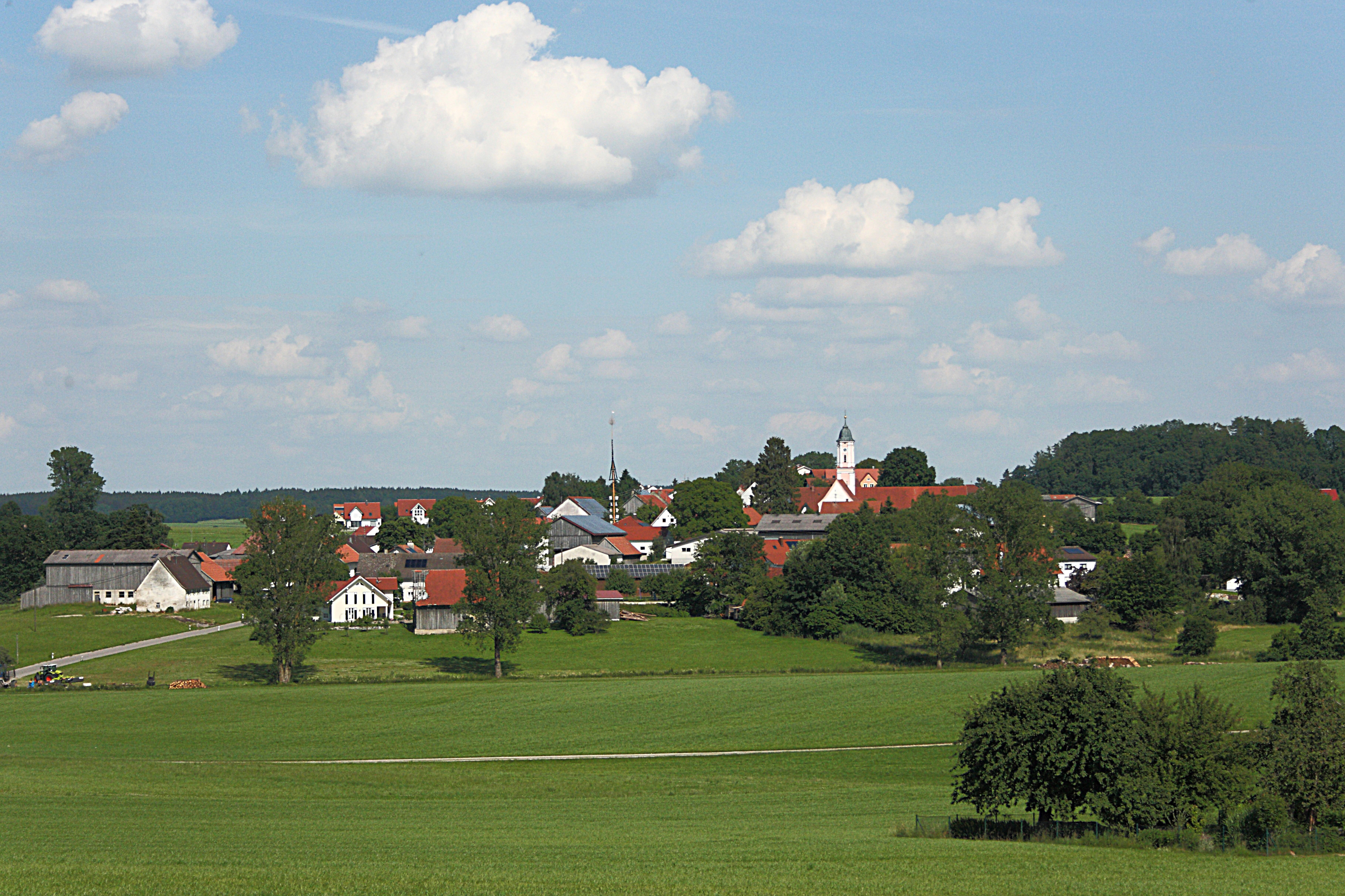 Egelhofen von Westen gesehen